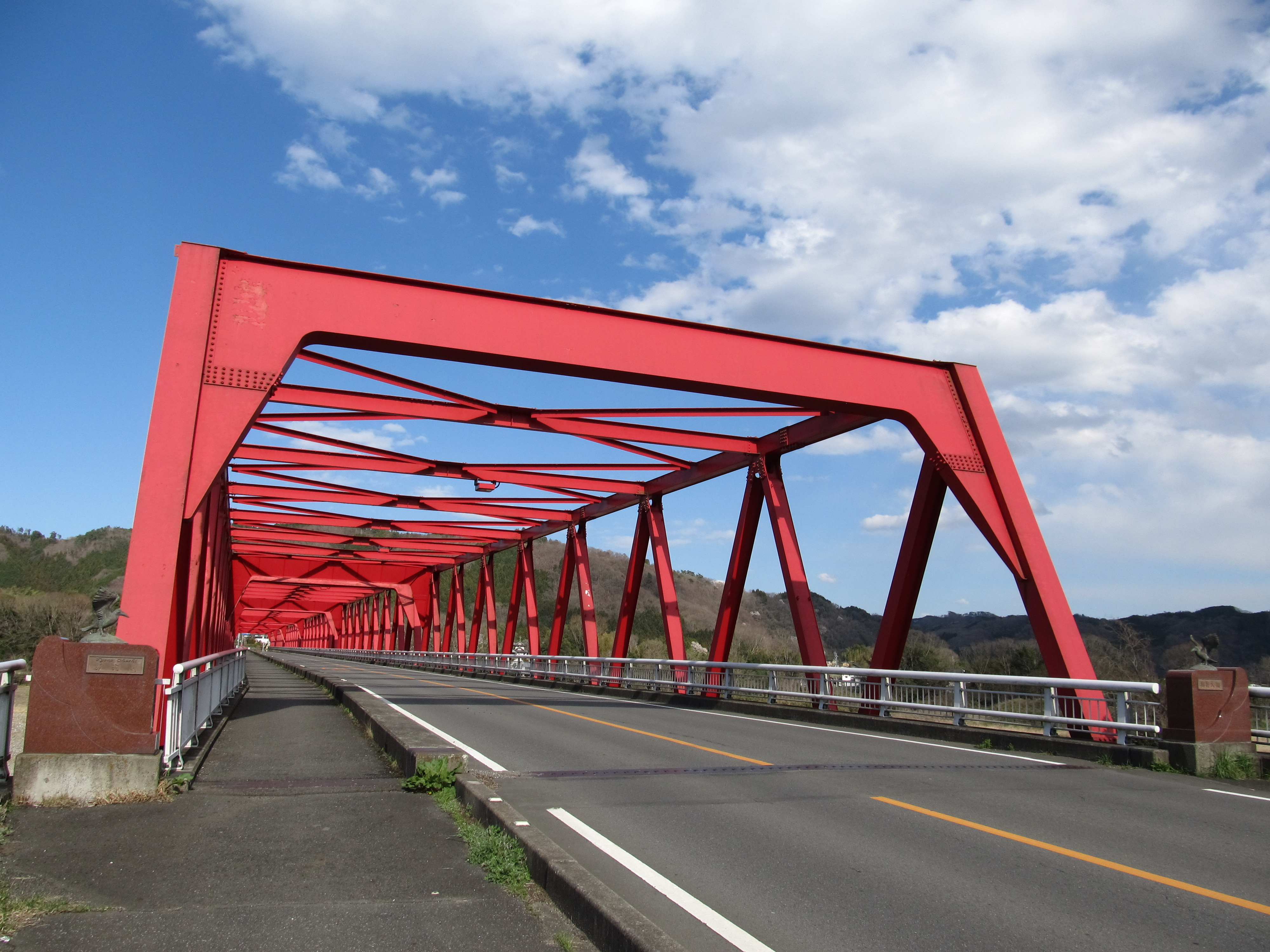 那珂川に架かる興野大橋。栃木県道27号那須黒羽茂木線の一部。橋の名は左岸の地名（那須烏山市興野）に因む。